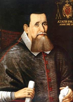 Jan Wężyk